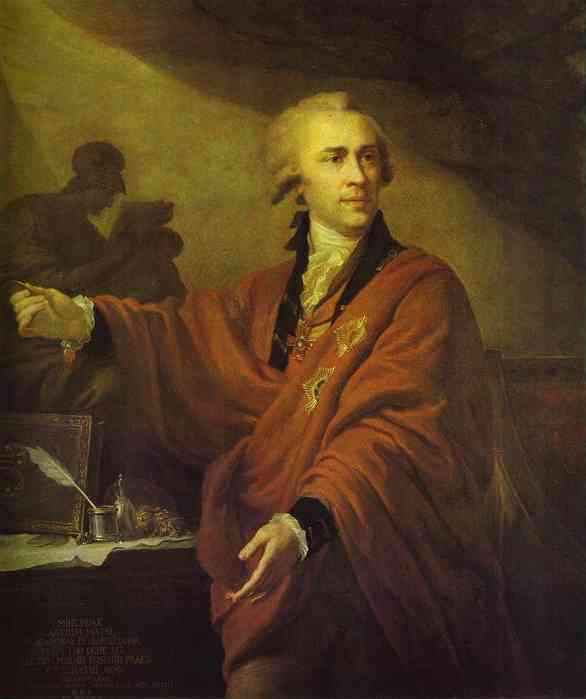 Obraz Musina-Puškina od Johanna Baptisty Lampiho staršího z roku 1794